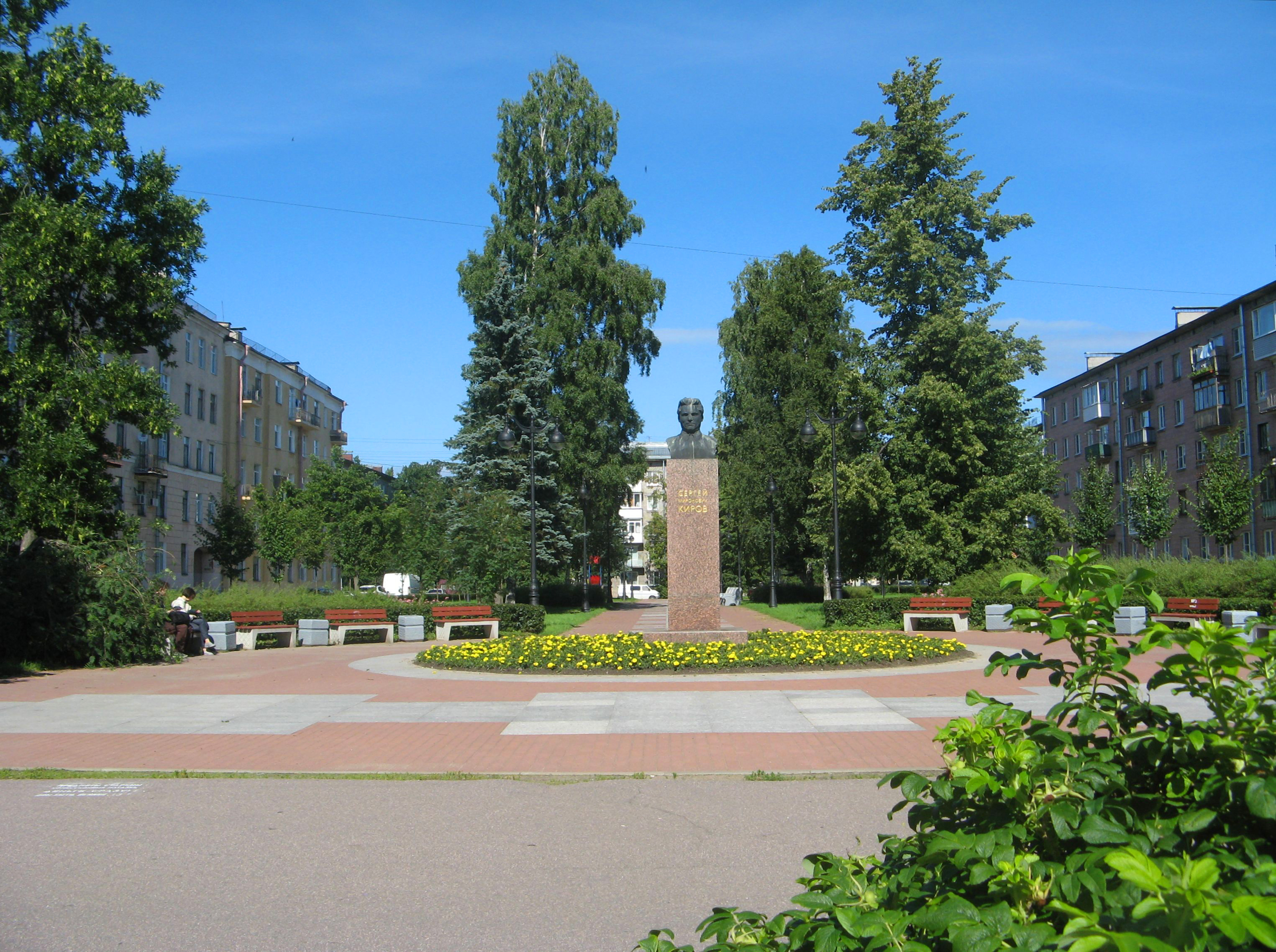 Кронштадт. Сквер Кирова